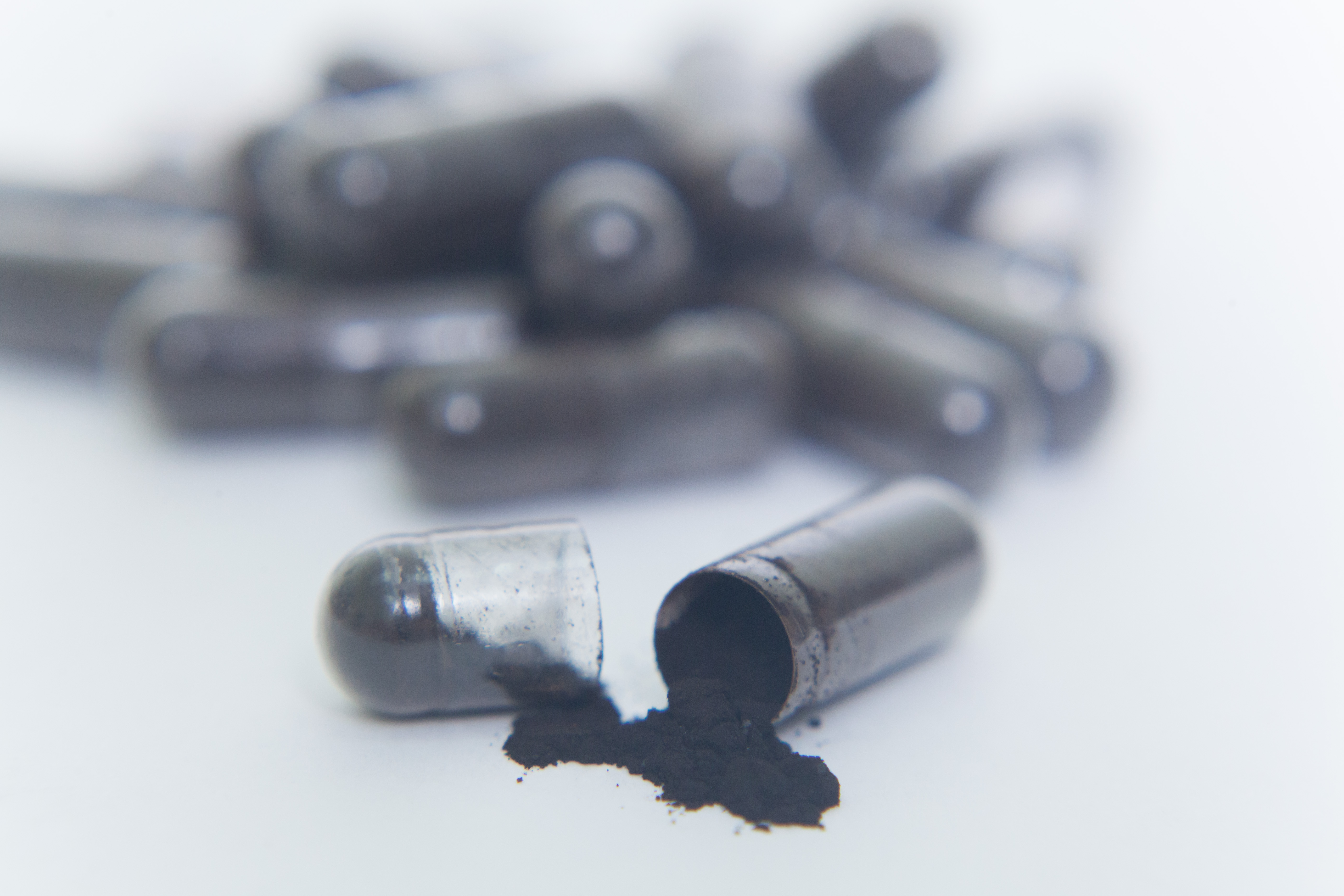 Леонардит в капсулах